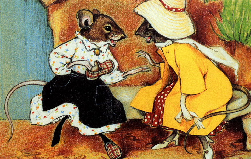 D'Maus Ketti an hir Cousine Mimm aus Clausen. Zeechnung vum Pierre Blanc.